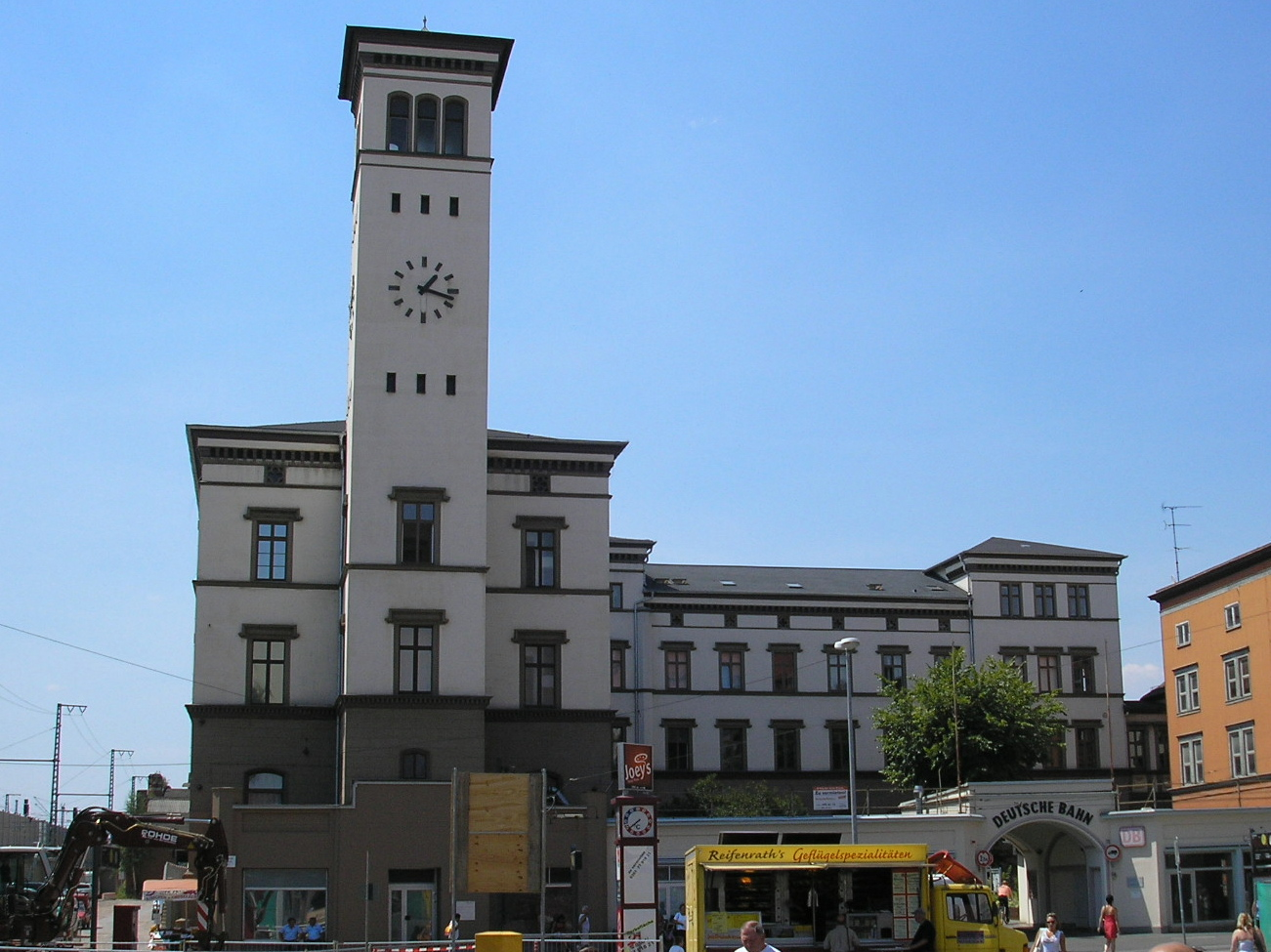 Alter Hauptbahnhof Erfurts (in Betrieb zwischen 1847 und 1890), nachfolgend u.a. als Sitz der Reichsbahndirektion Erfurt genutzt.